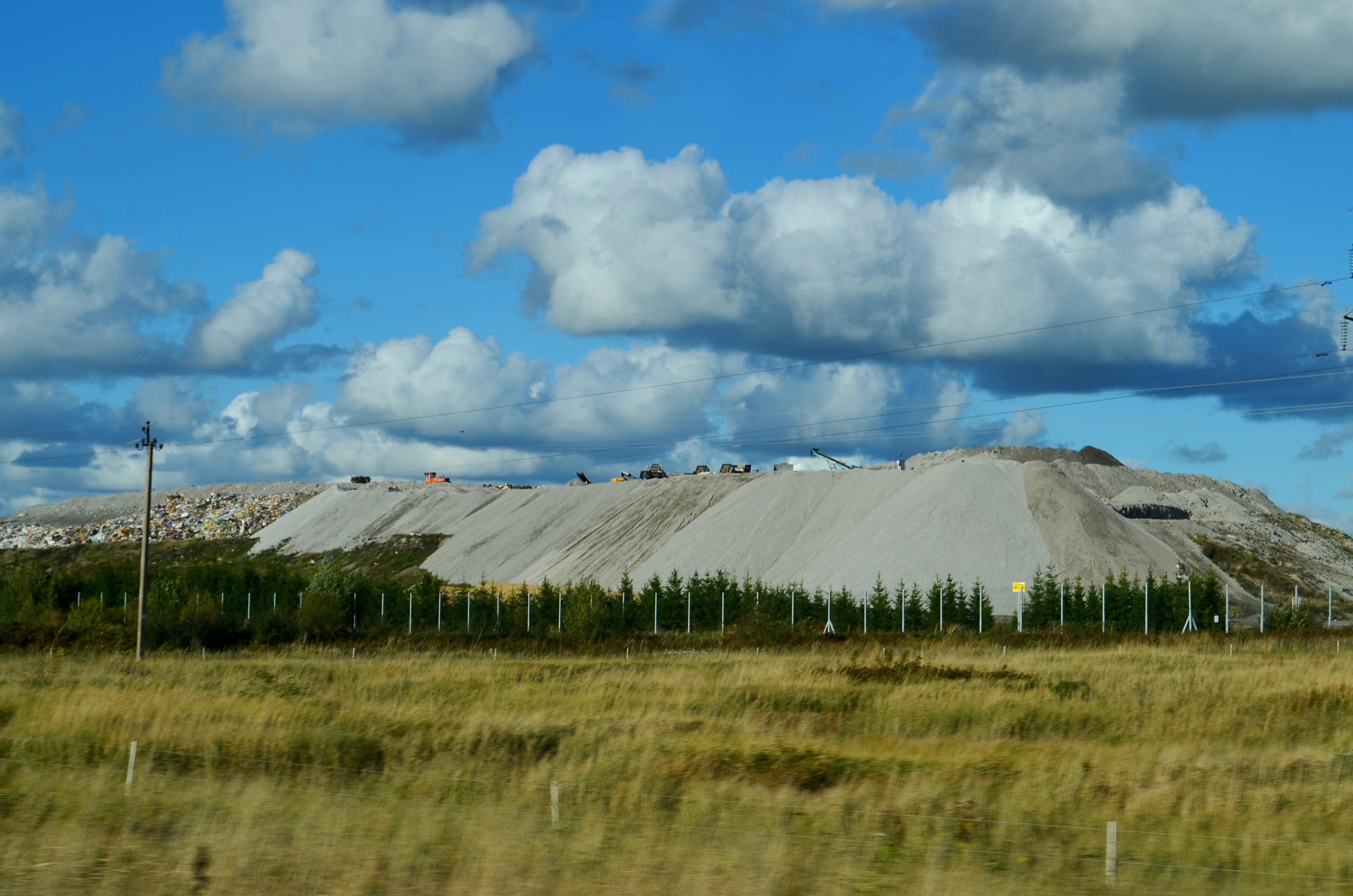 Pavojingų atliekų sąvartynas, Dumpių k., Klaipėdos raj.